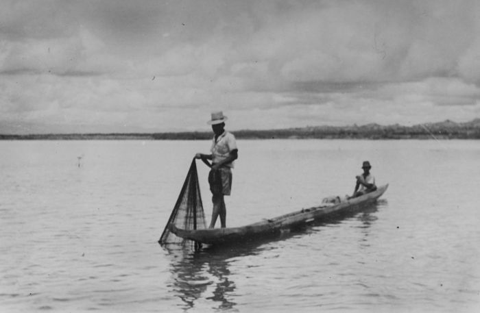 Repronegatief. Vissers op het meer, Senkang, Zuid-Celebes